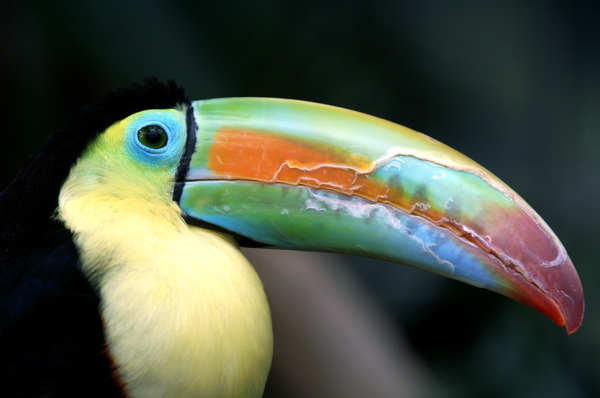 Fischertukan in der Wilhelma